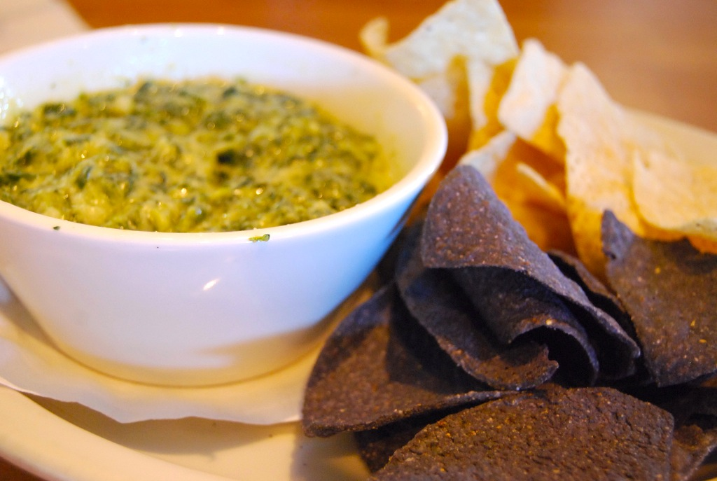 spinach & artichoke dip